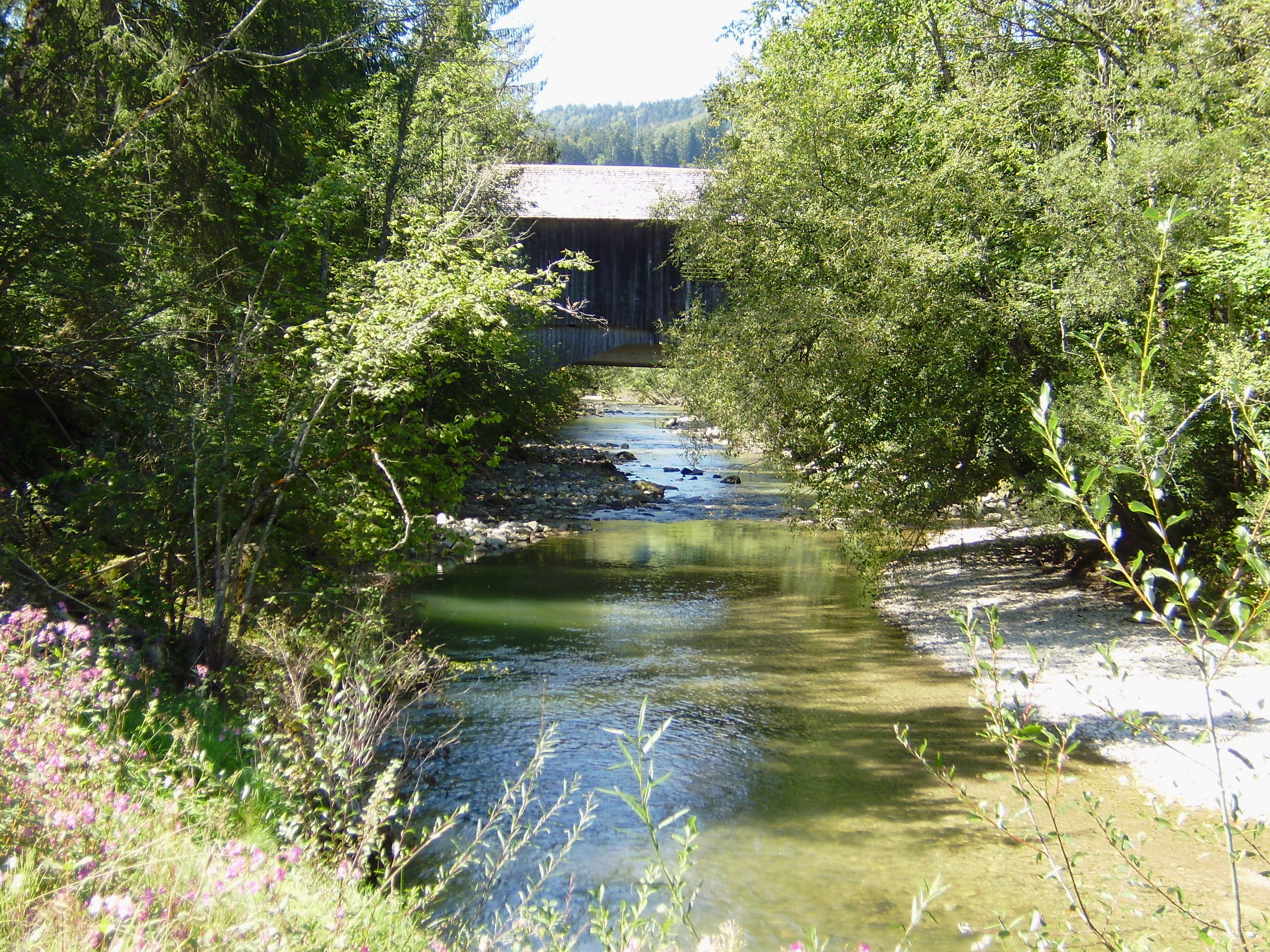 Gschwendmühlbrücke über die Weißach Vbg unweit Aach, von Osten